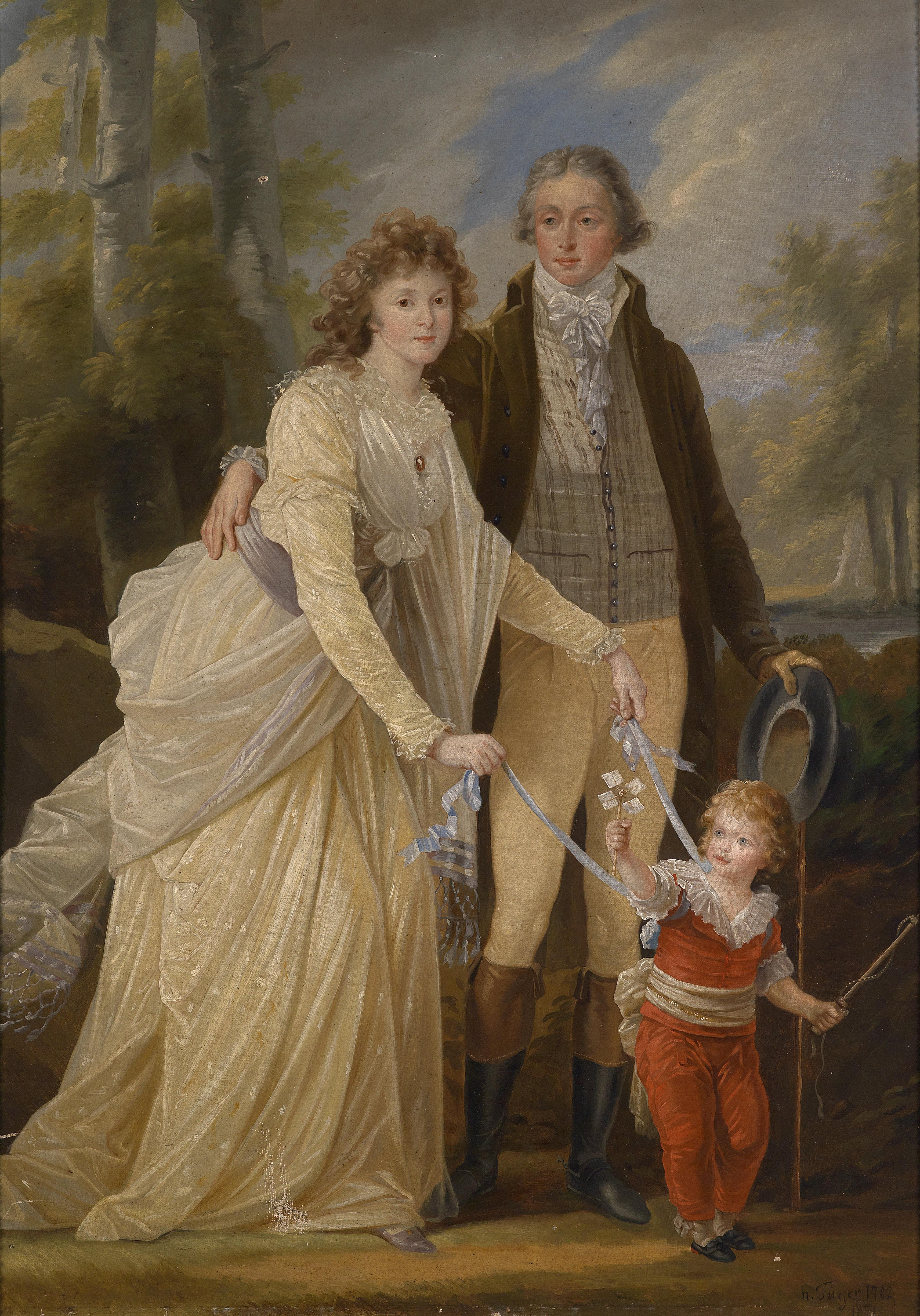 Prinz Karl von und zu Liechtenstein (1765-1795) mit seiner Gemahlin Maria Anna Josepha, Gräfin von Khevenhüller-Metsch (1770- 1849) und ihrem Sohn Karl (1790-1865).